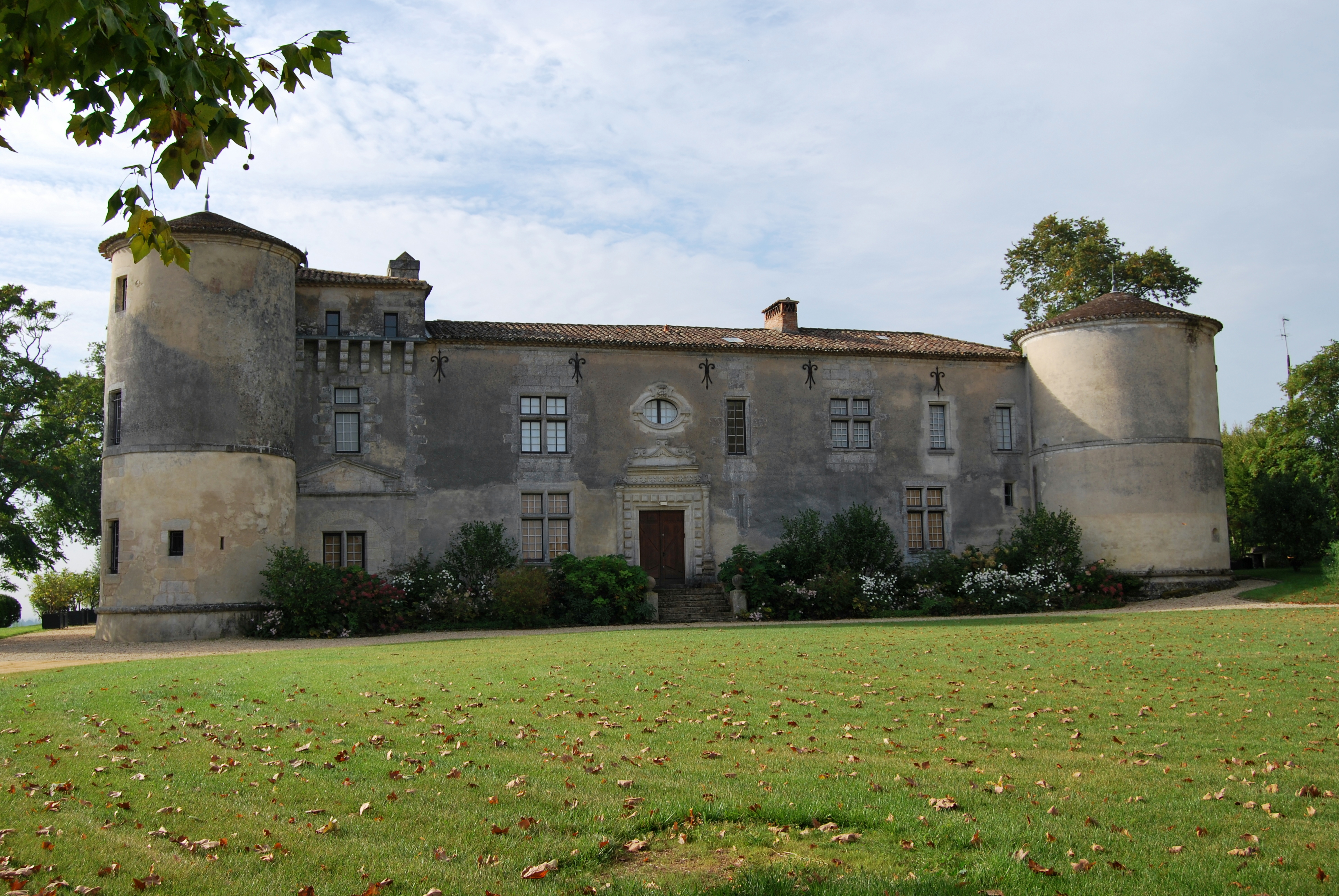 Château de Carles .